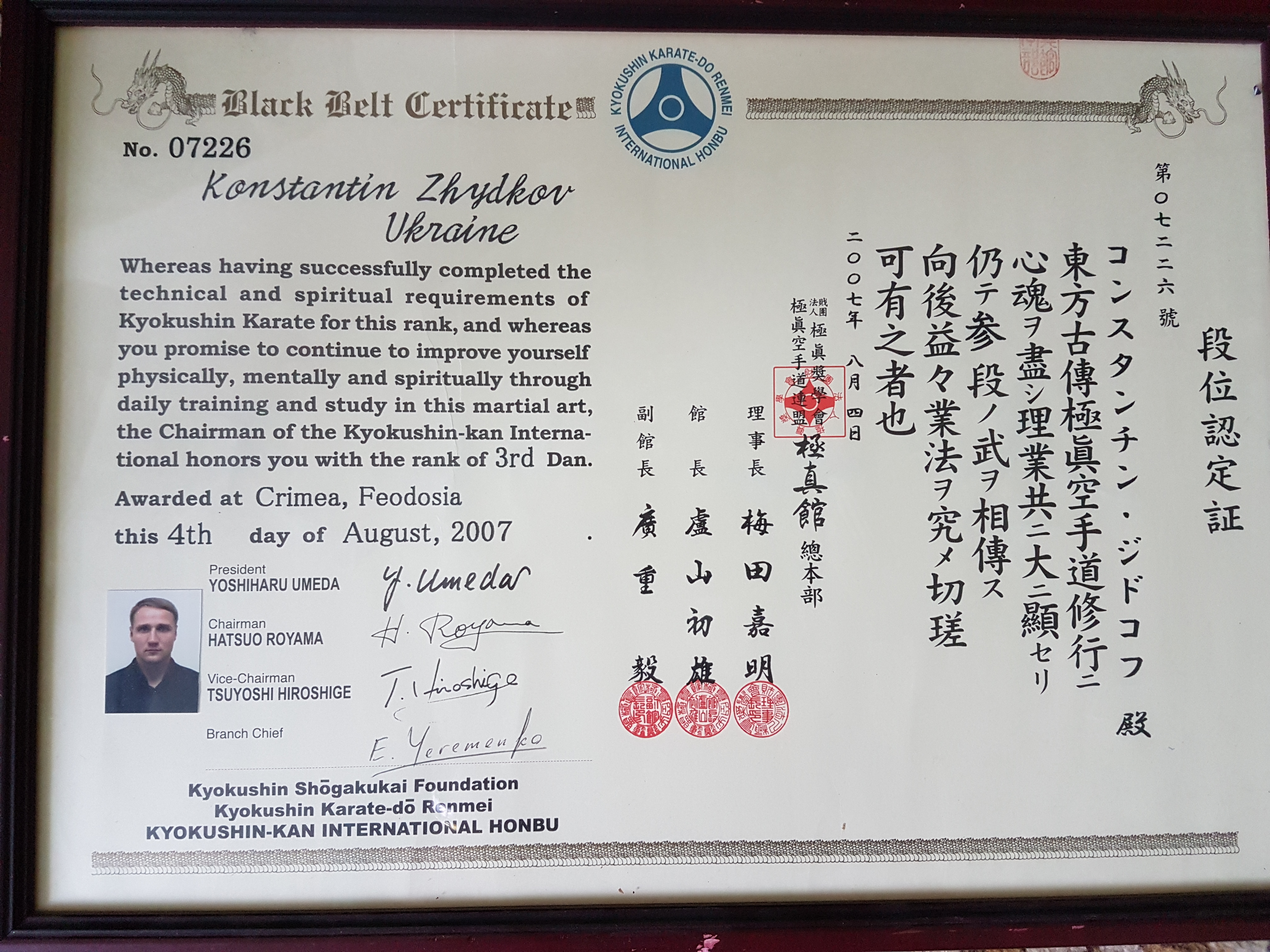 Свідоцтво про отримання Костянтином Жидковим чорного поясу